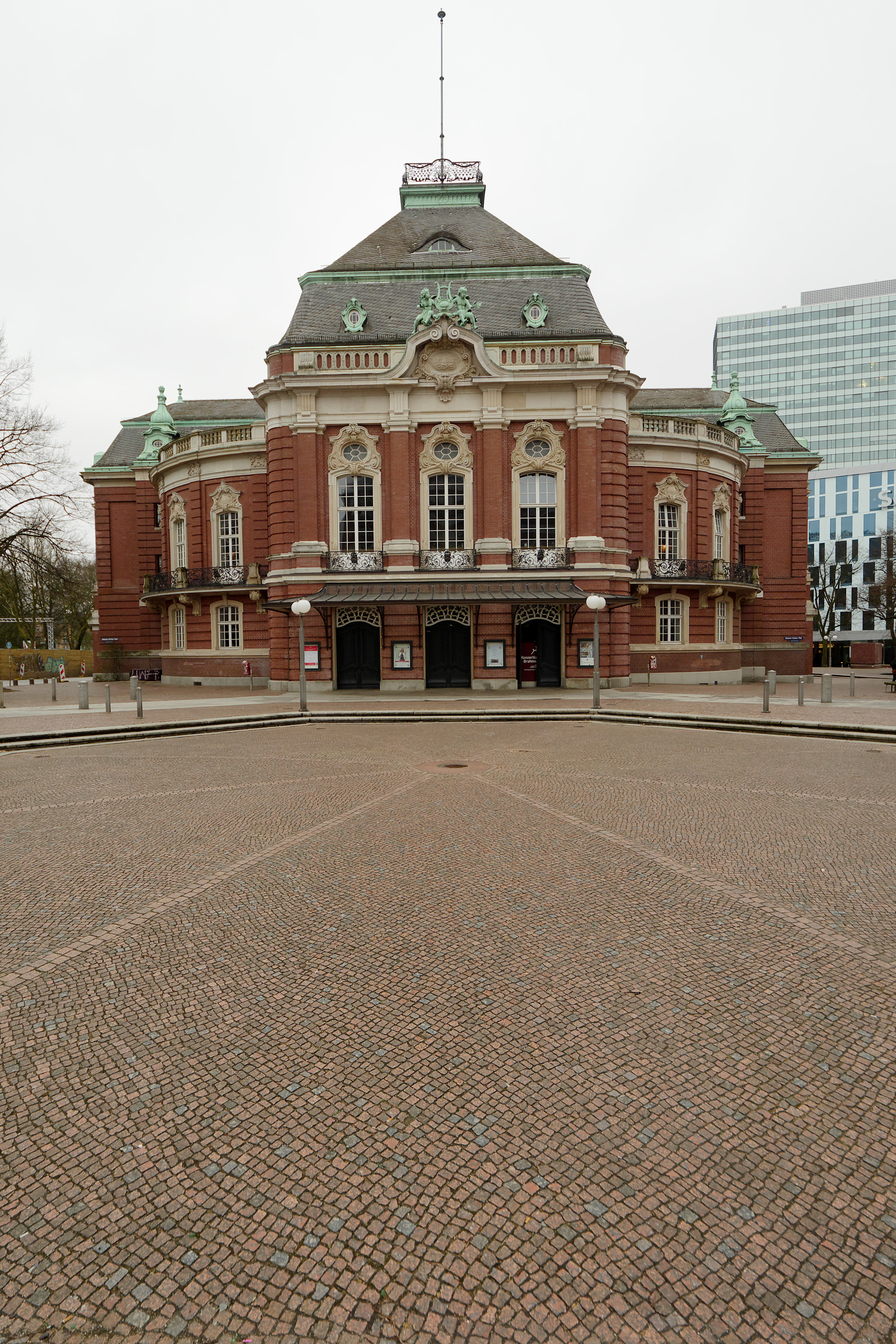 Vorderfront der Laeiszhalle in Hamburg vom Johannes-Brahms-Platz aus Richtung Südwesten gesehen.